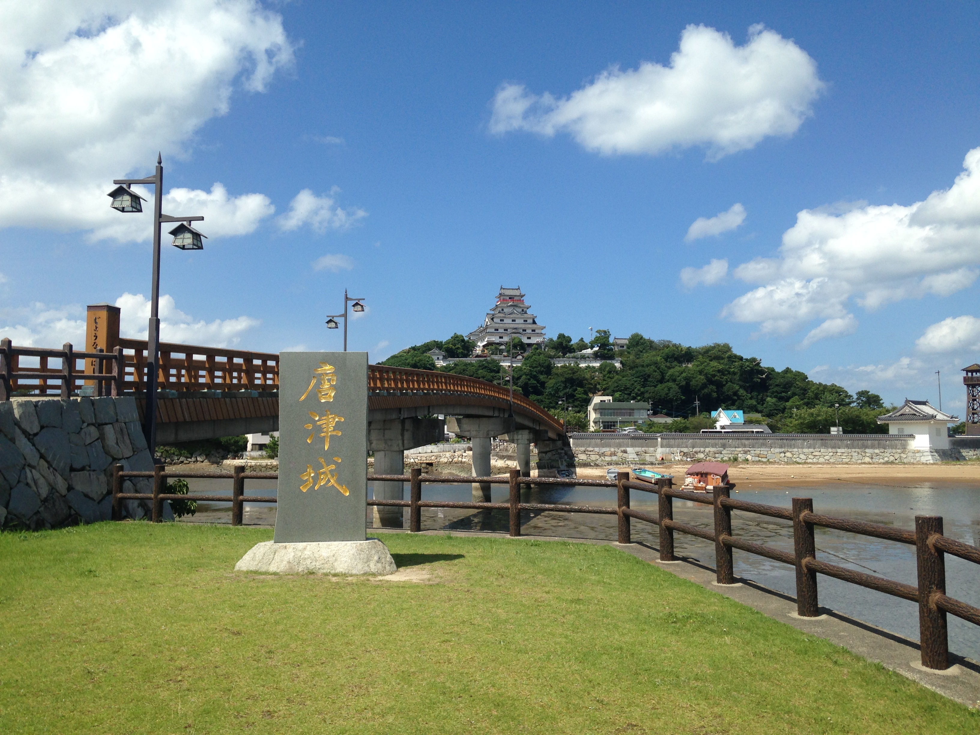 唐津城・天守閣と城内橋